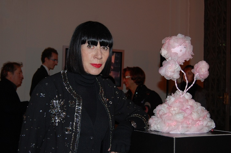 Chantal Thomass posant avec sa poupée pour l'UNICEF lors du vernissage des frimouses 2011